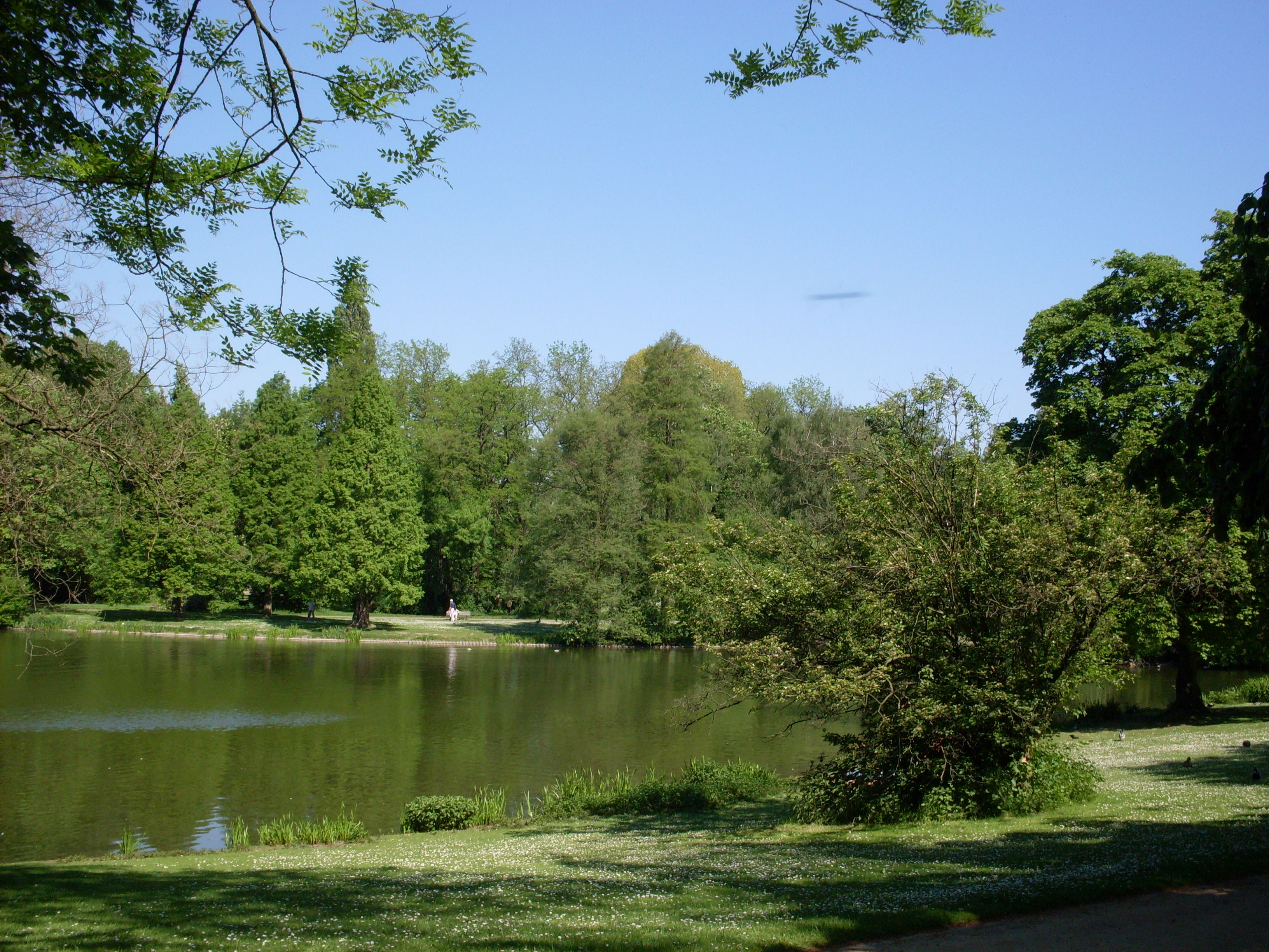 Düsseldorf-Düsseltal Zoopark